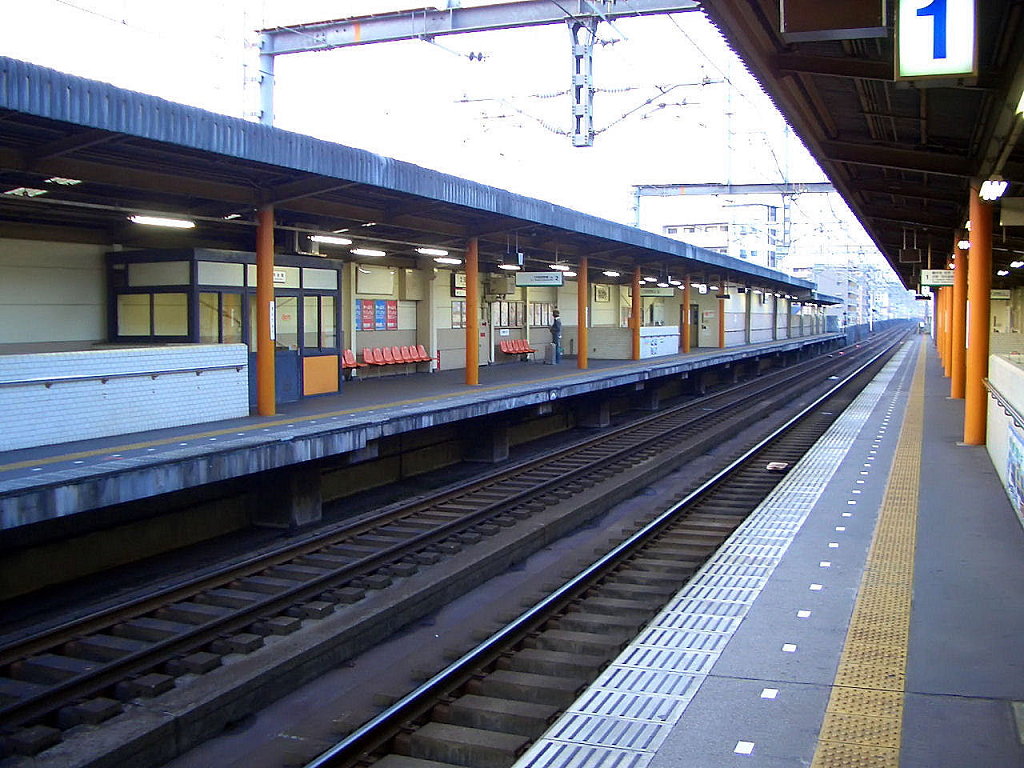 Higashisumiyoshi-ku, Osaka City, Osaka, Japan